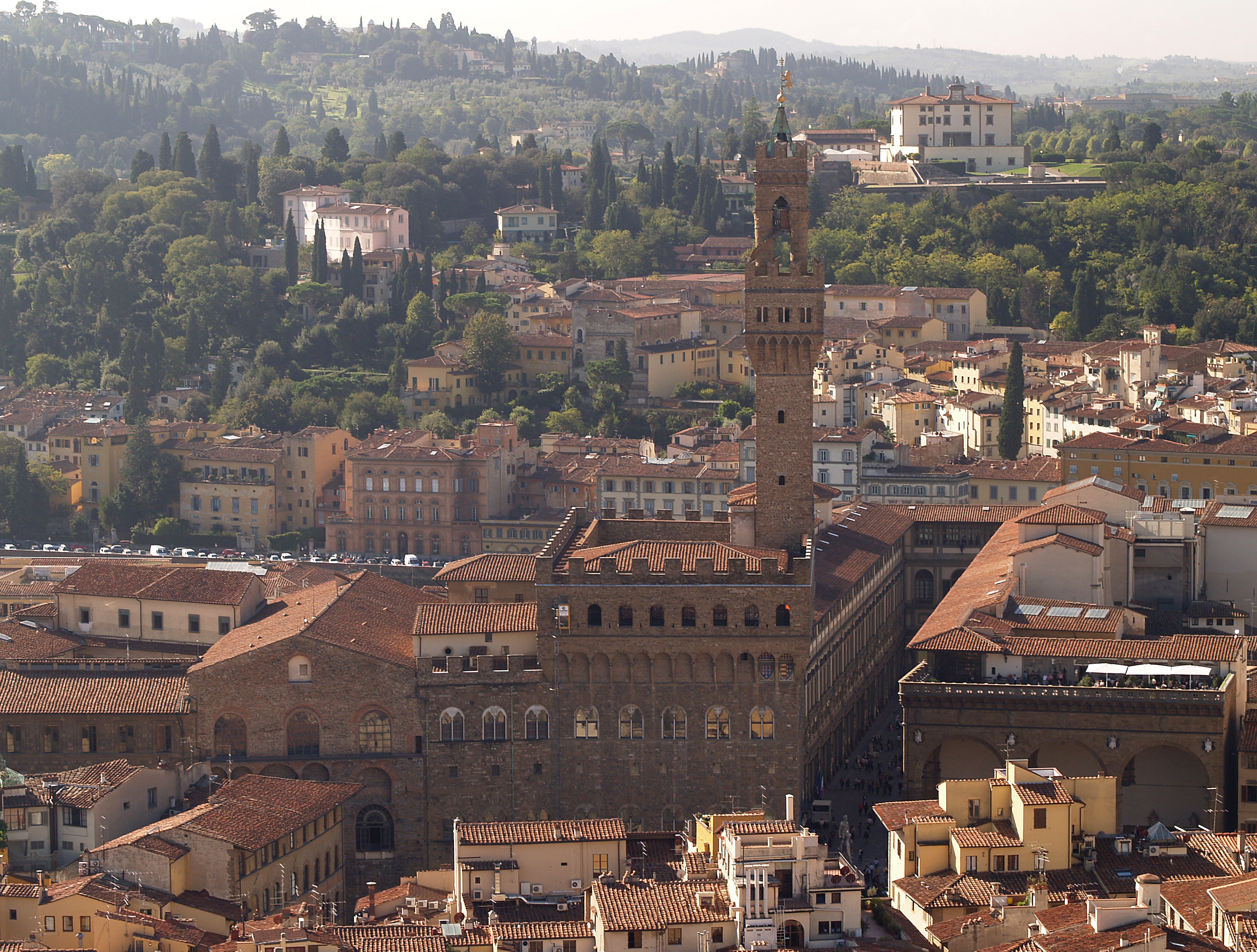 View from the cupola of Santa Maria del Fiore in south-west direction to Palazzo Veccio, Galleria degli Uffizi and Loggia dei Lanzi